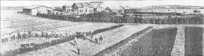 Kolonie für Tagelöhner und Ansiedler in Düring, gegründet von Eberhard Cronemeyer, benannt nach Kronprinz Friedrich Wilhelm.